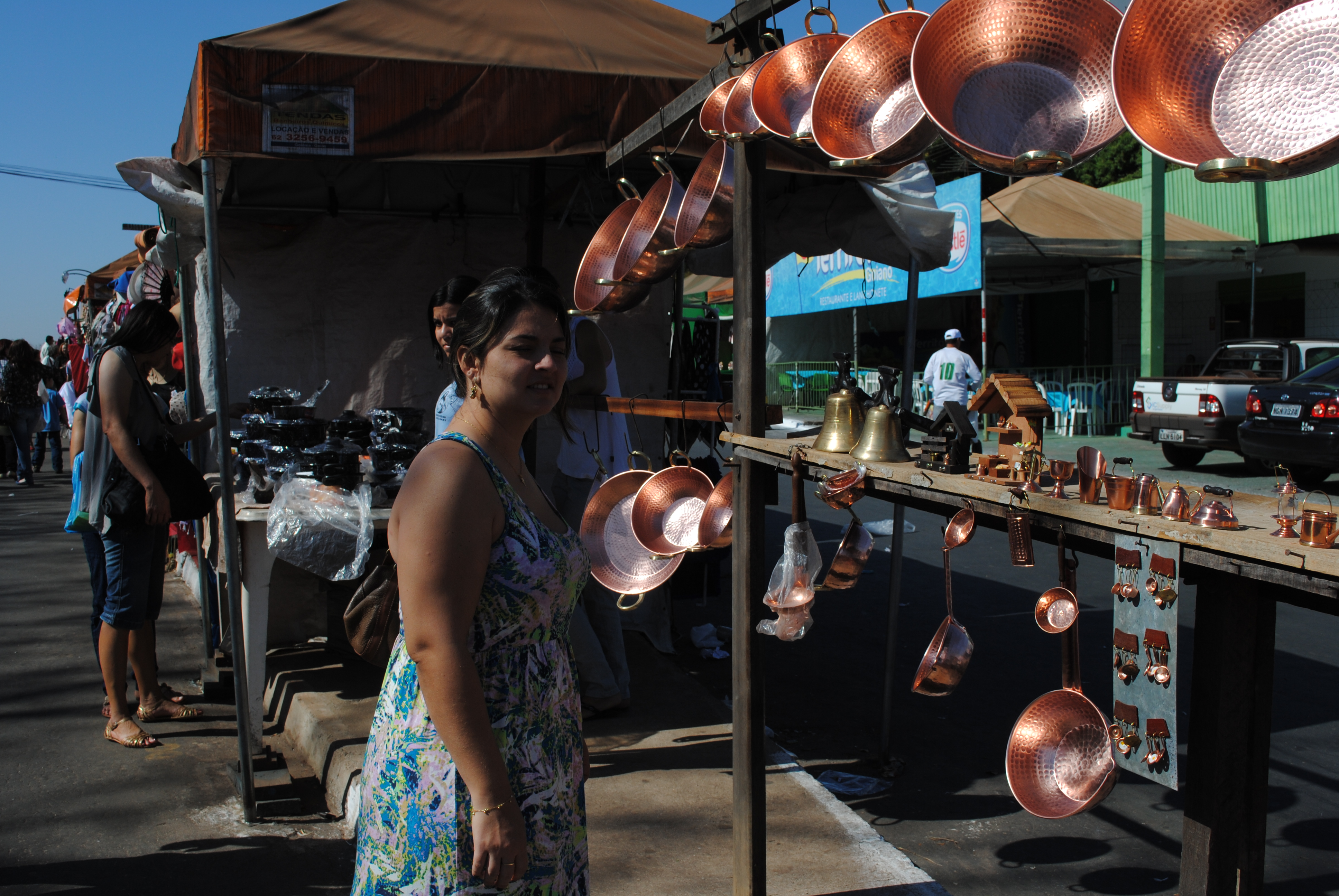 Comércio legalizado em Trindade, Goiás, Brasil durante a Festa do Divino Pai Eterno.